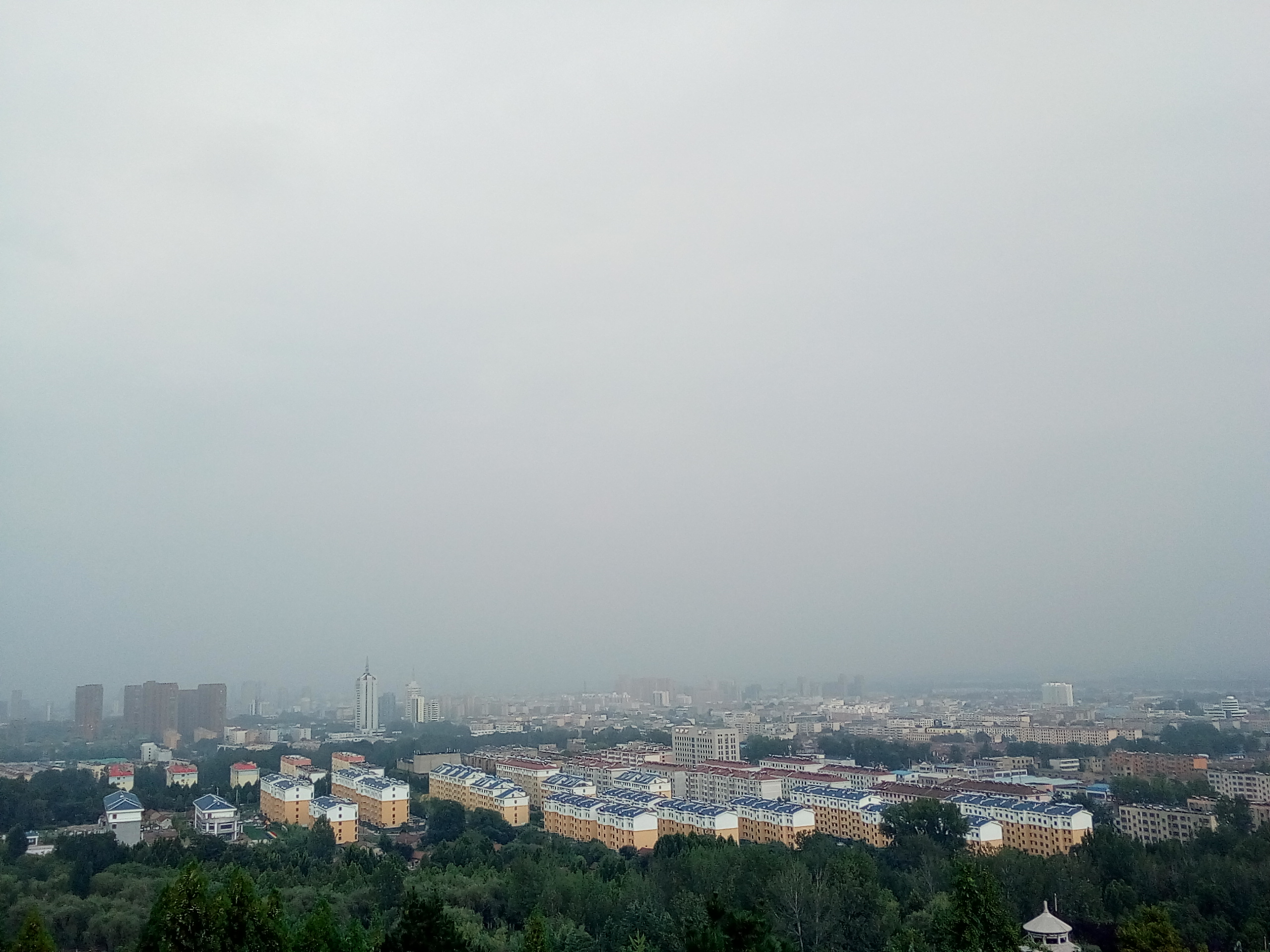 莱芜市莱城区城西风景